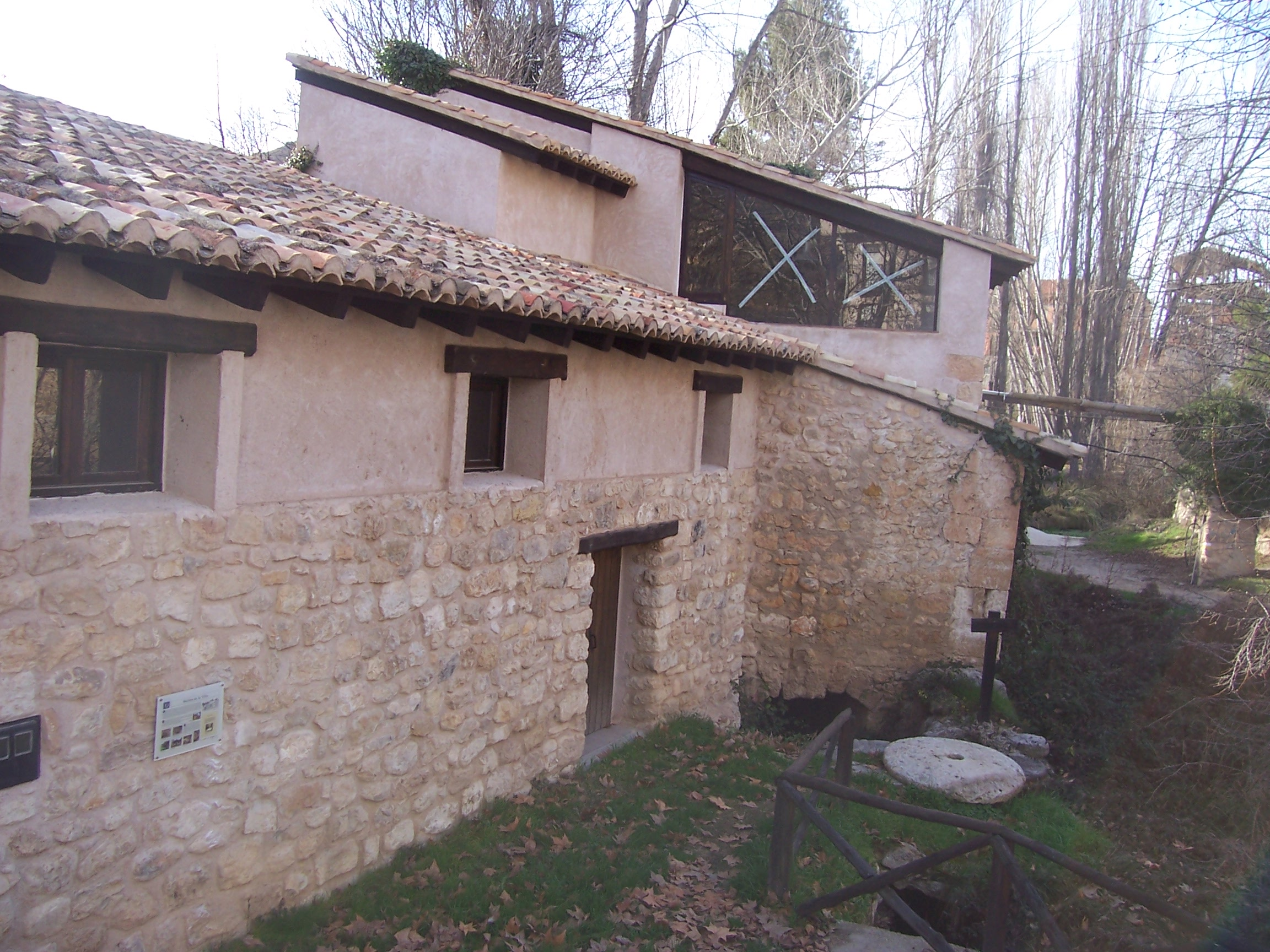 Vista general